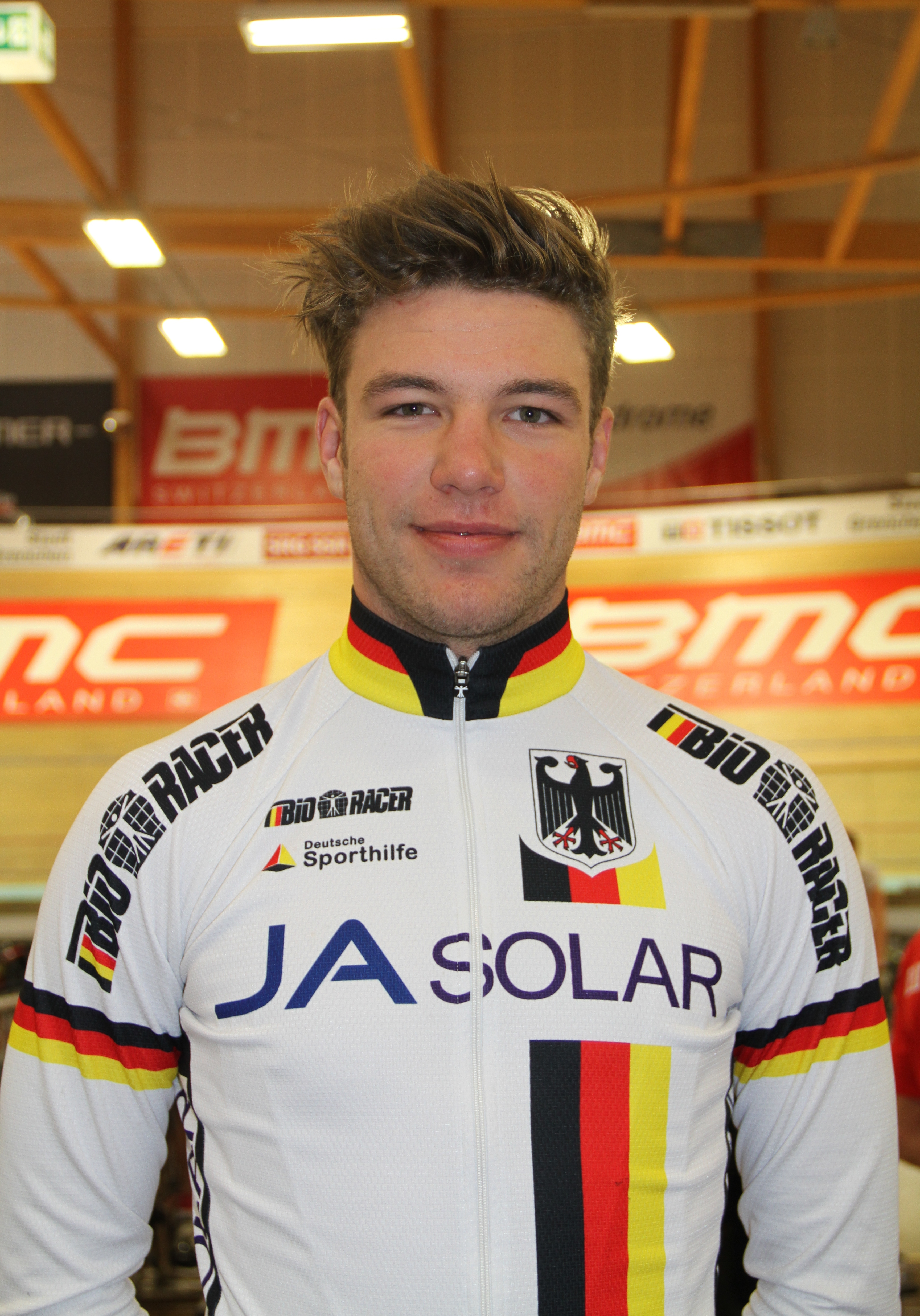 Domenic Weinstein, deutscher Radsportler The making of this document was supported by the Community-Budget of Wikimedia Germany.